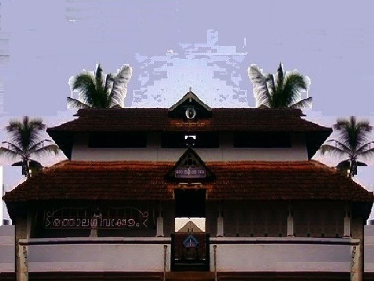 തൃത്താല ക്ഷേത്രം